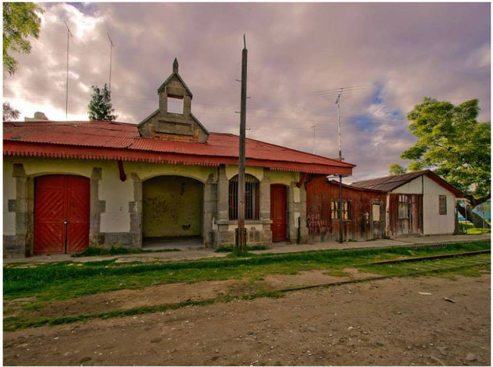 Estación Mazapa